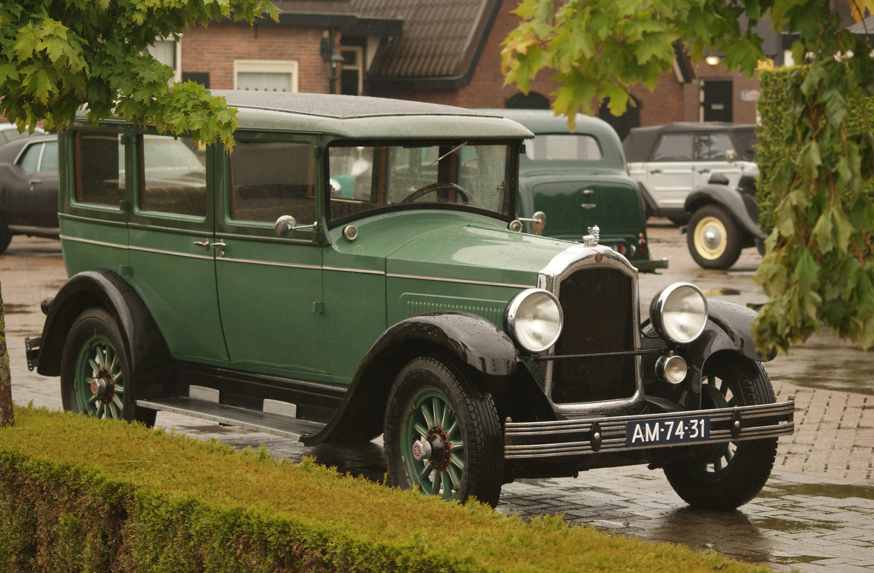 AM-74-31 Oldtimerdag Ederveen 2014